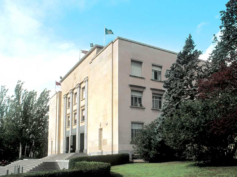 Fachada principal de la Escuela Técnica Superior de Arquitectura de Madrid (España).